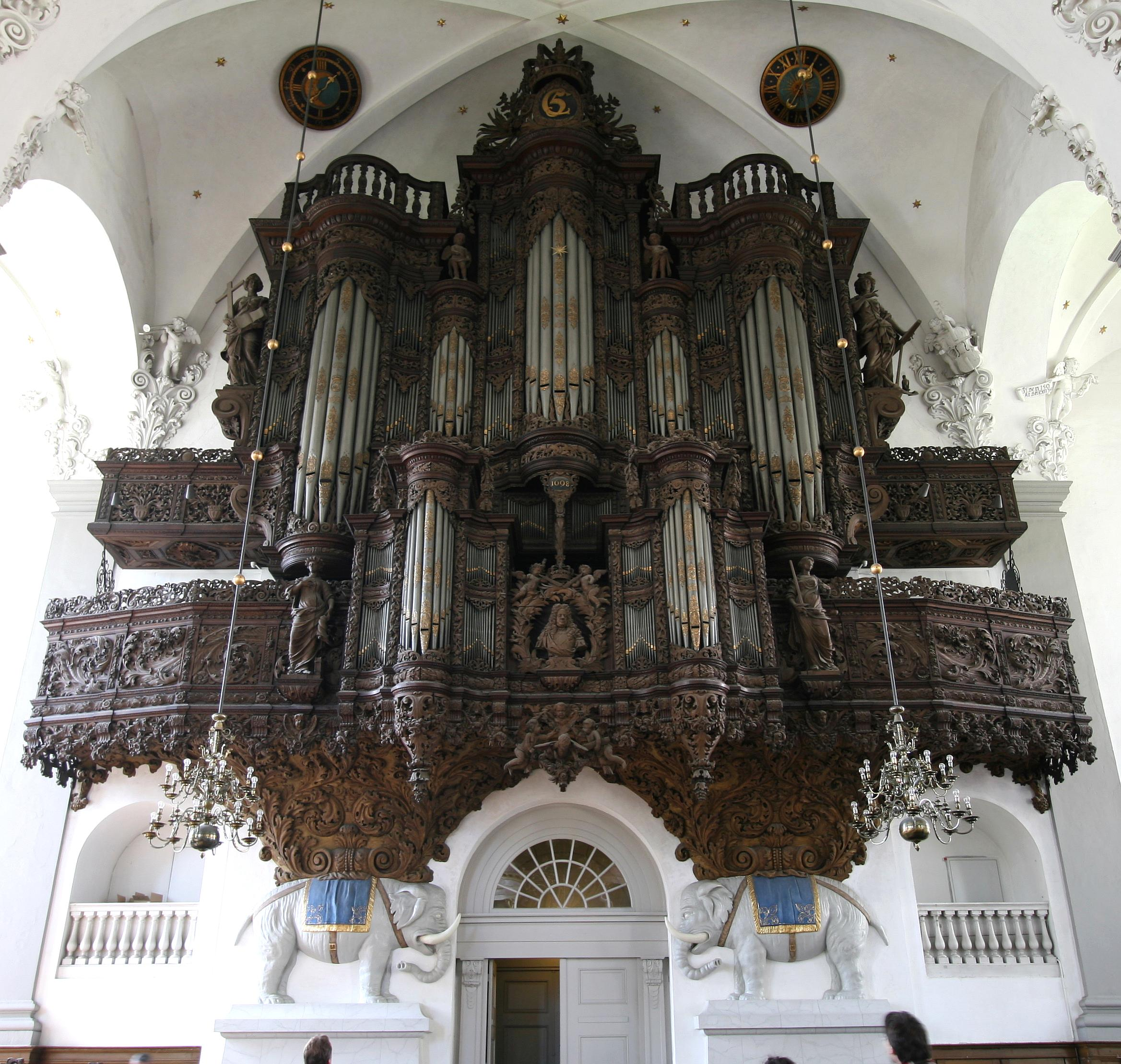 Vor Frelser Kirke (Church of Our Saviour), Copenhagen, Denmark. Organ front.